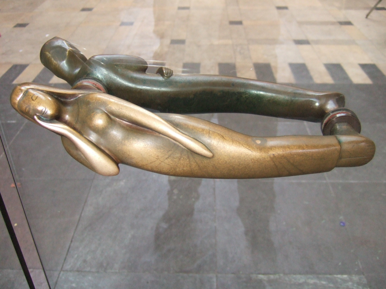 Elisabeth Bäumer: Türgriffe Standort: Universität – Anschlaghalle Bronze 1959